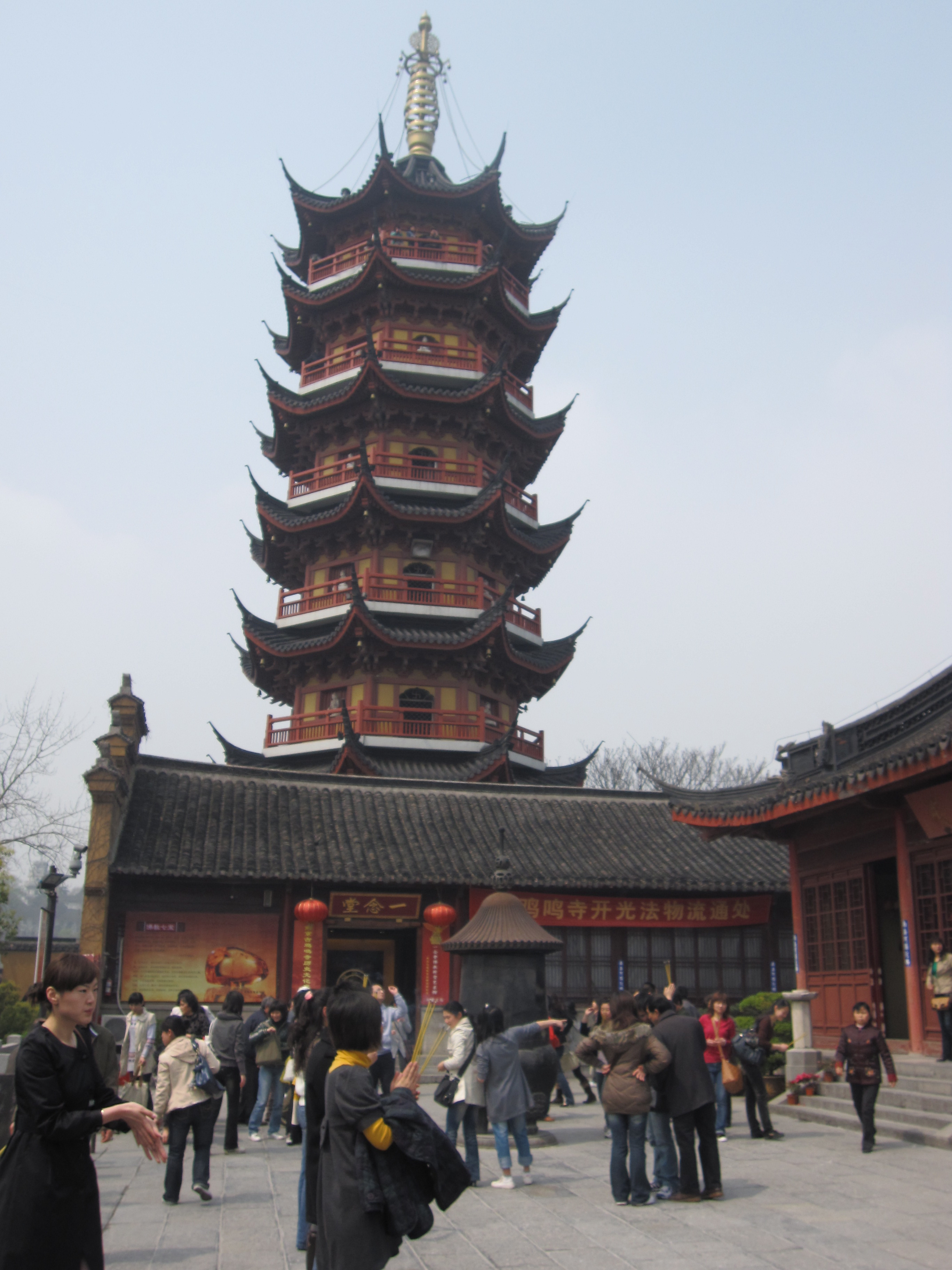 Pagoda at Jiming Temple